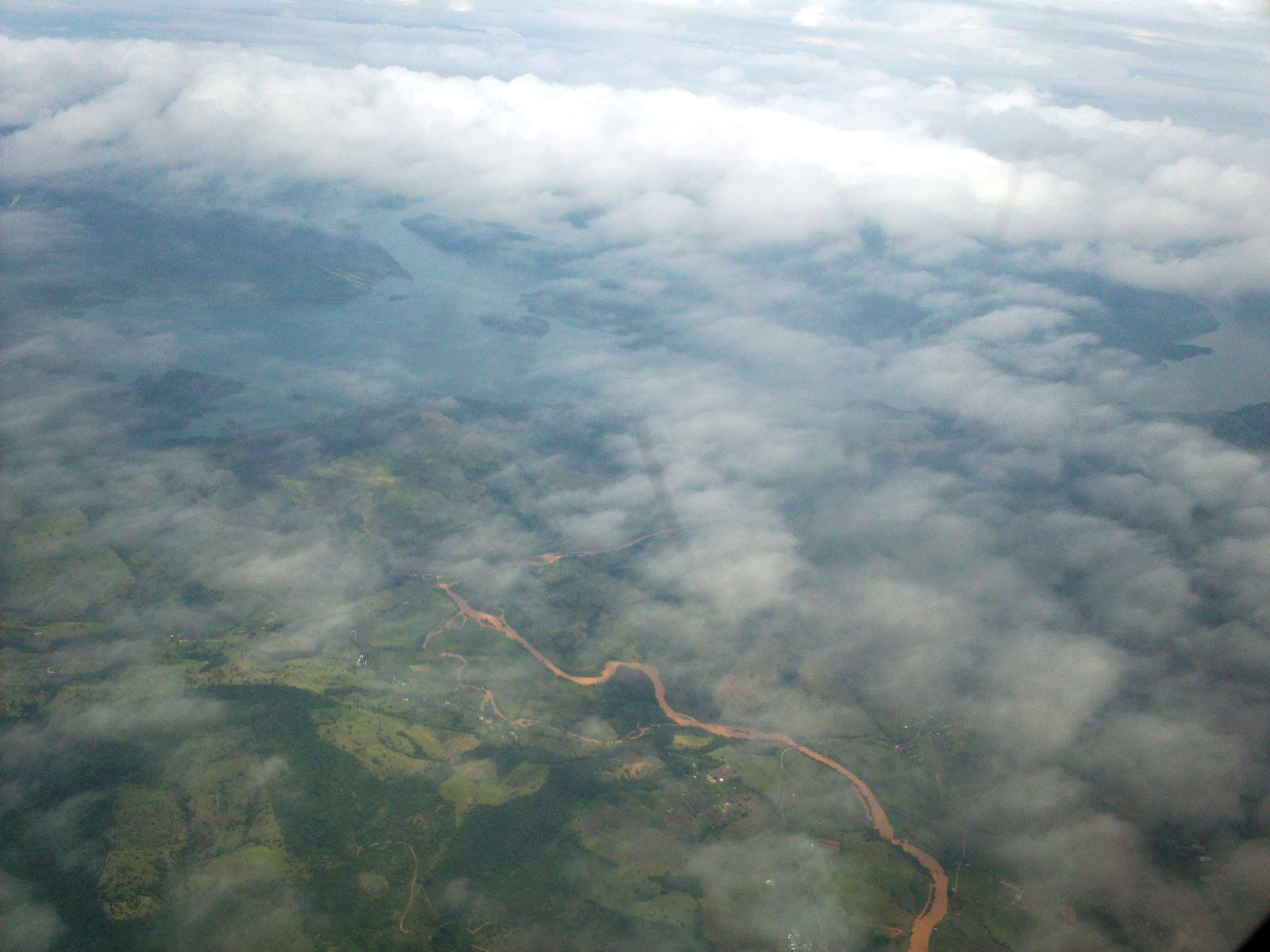 Embalse la Vueltosa y Rio Caparo, limites entre Tachira, Merida y Barinas.